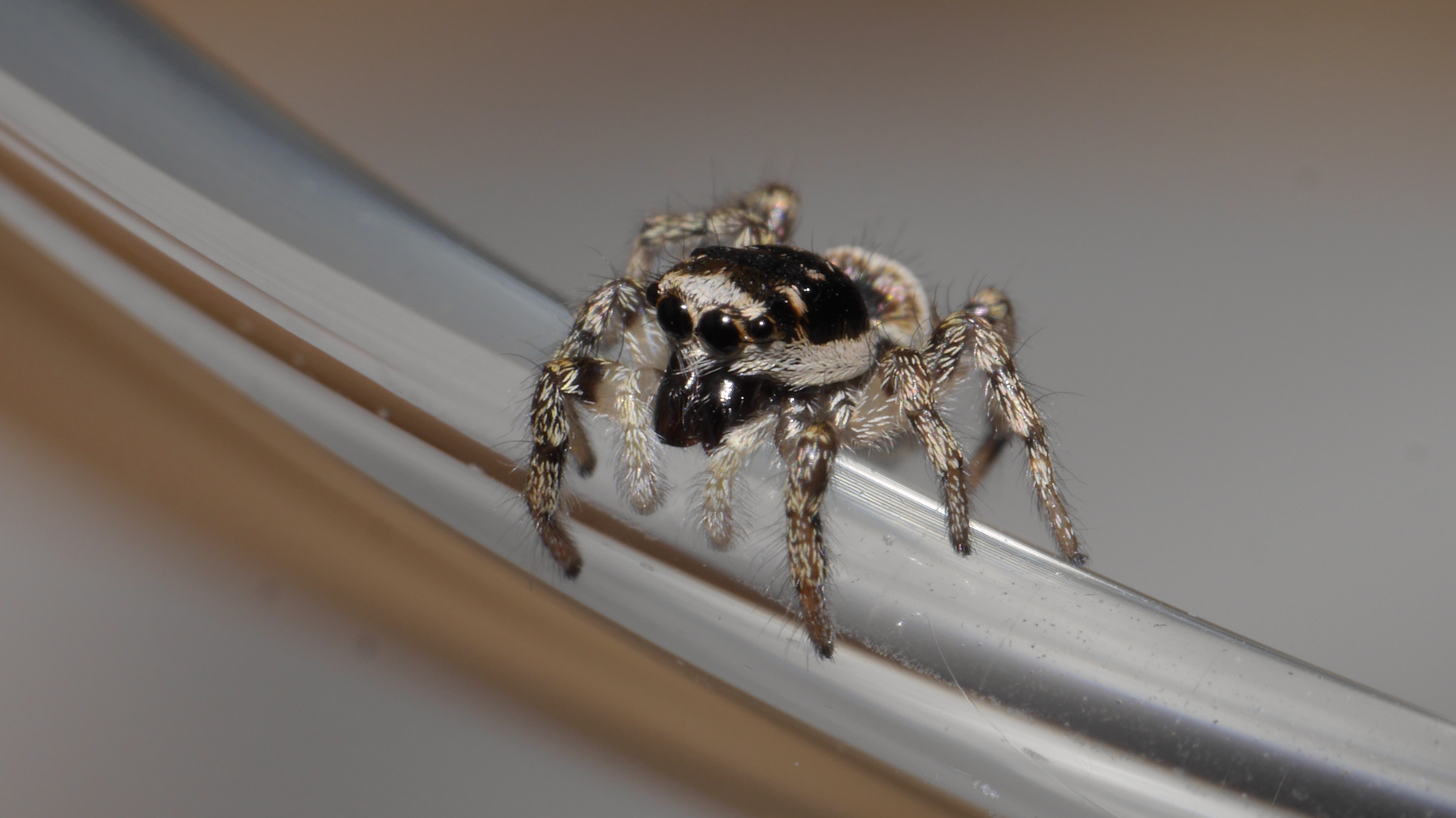 Zebraspringspinne - Salticus scenicus, Weibchen. Aufgenommen in Mannheim-Vogelstang, Baden-Württemberg, Deutschland.